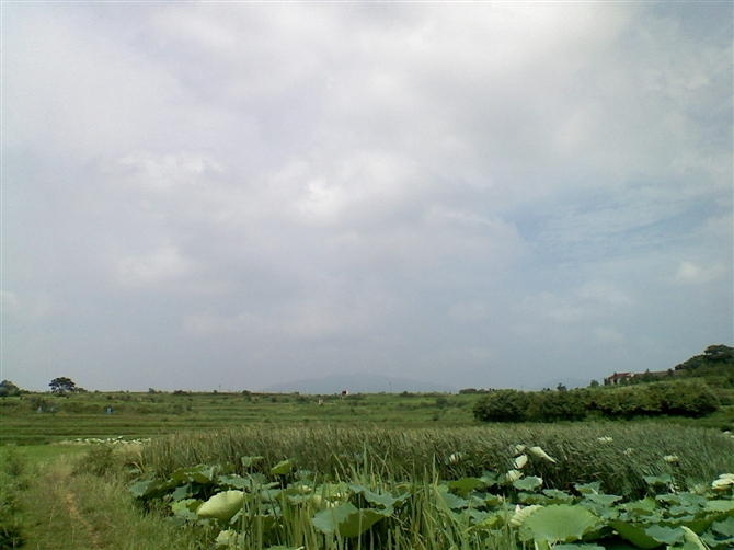 Xiaochang, Xiaogan, Hubei, China